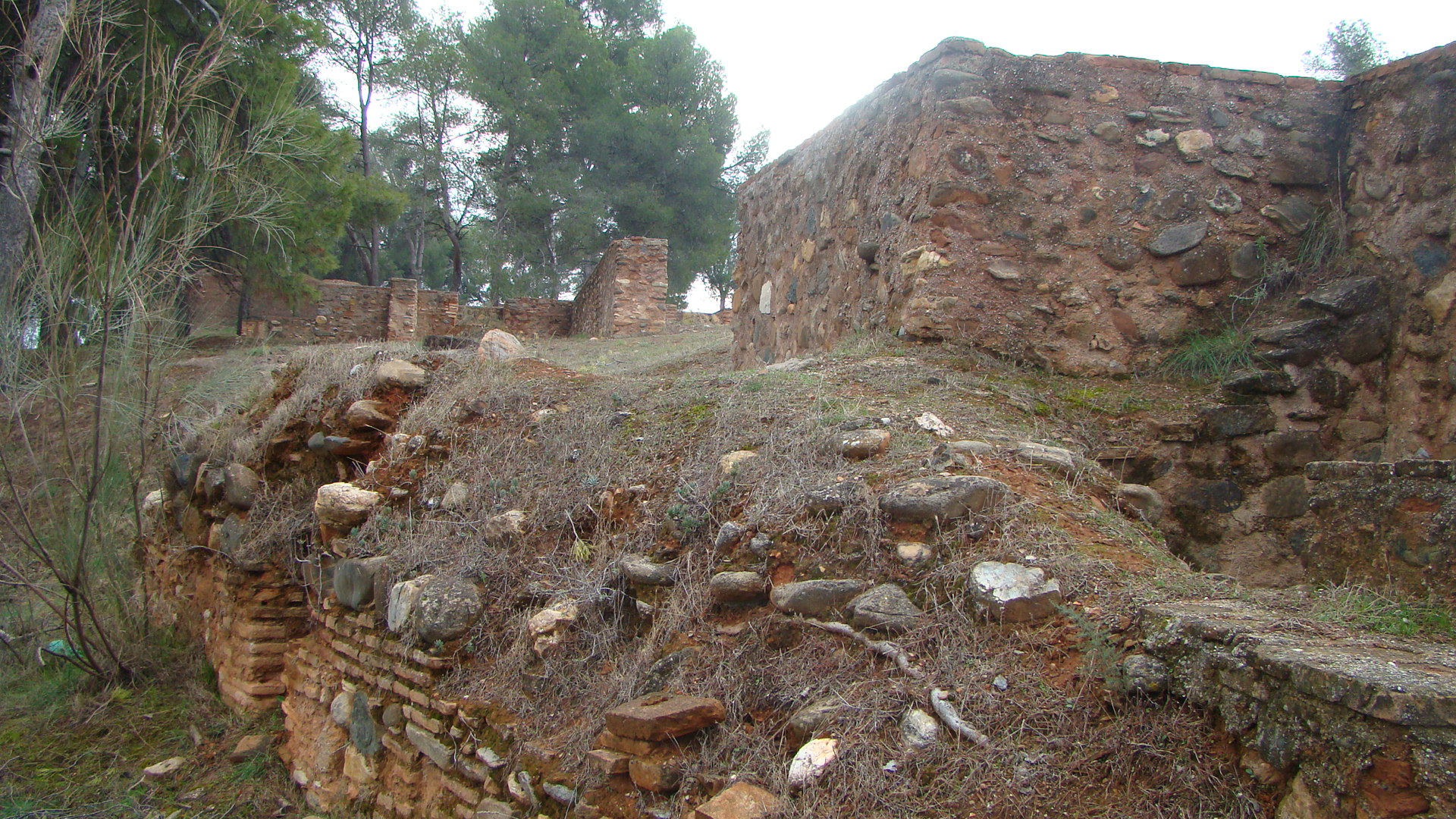 Restos de los muros periféricos del palacio de Dar al-Arusa, en la Alhambra